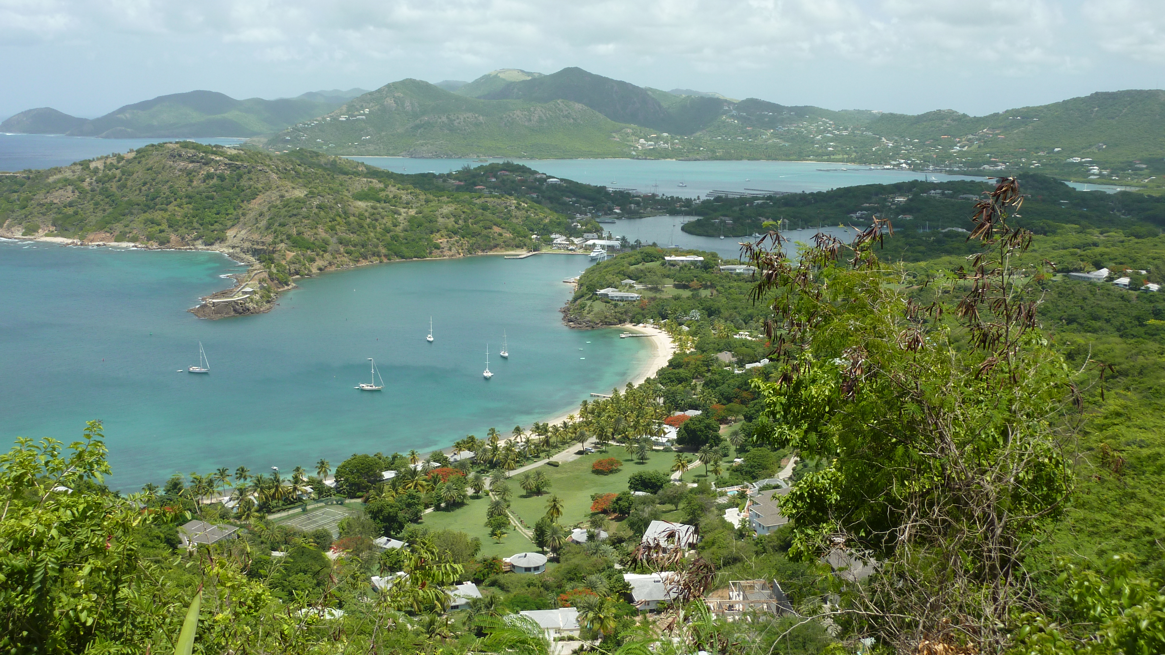 Antigue